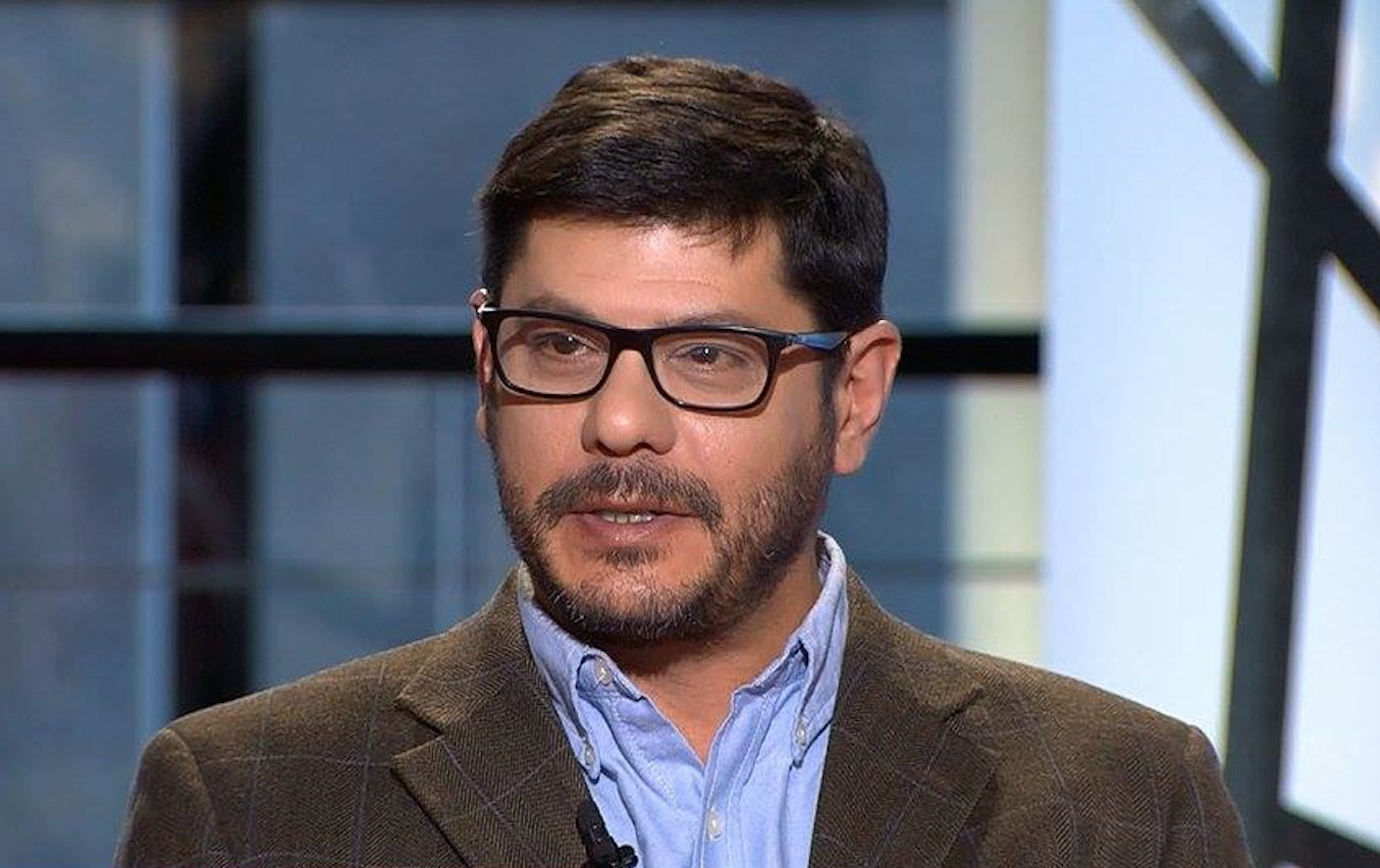 Samim Akgönül